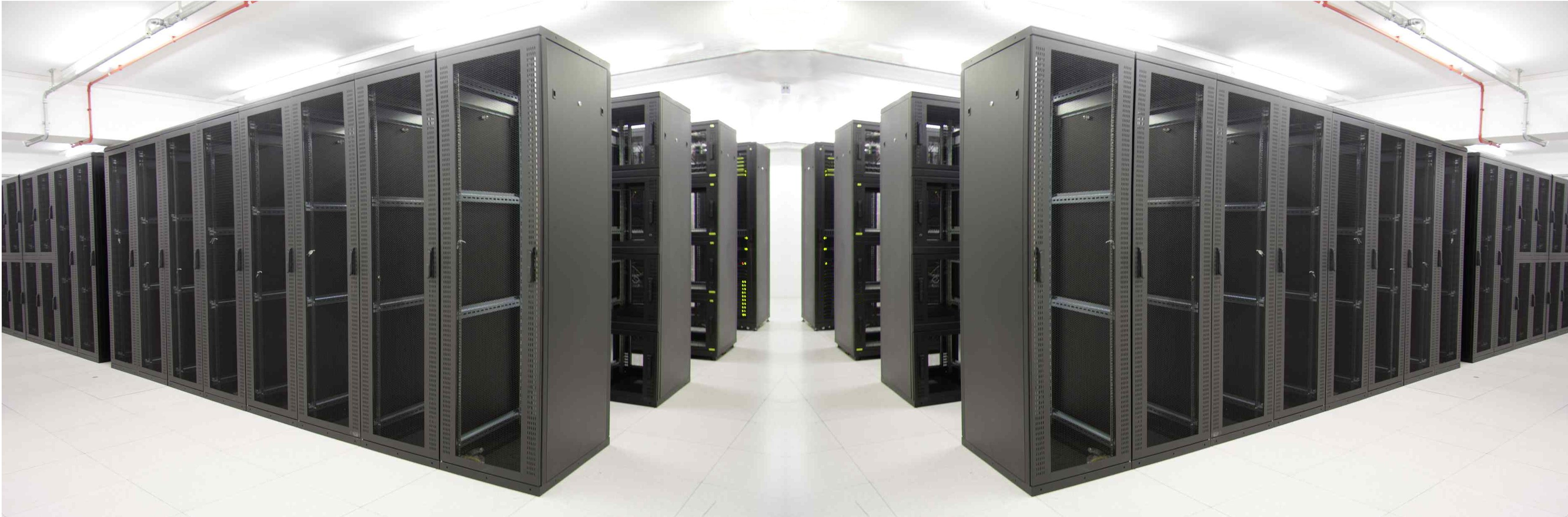 Computer Serverräume Referenzen Green-IT Rechenzentren und Serverräume Green-IT DataCenter UpGrade